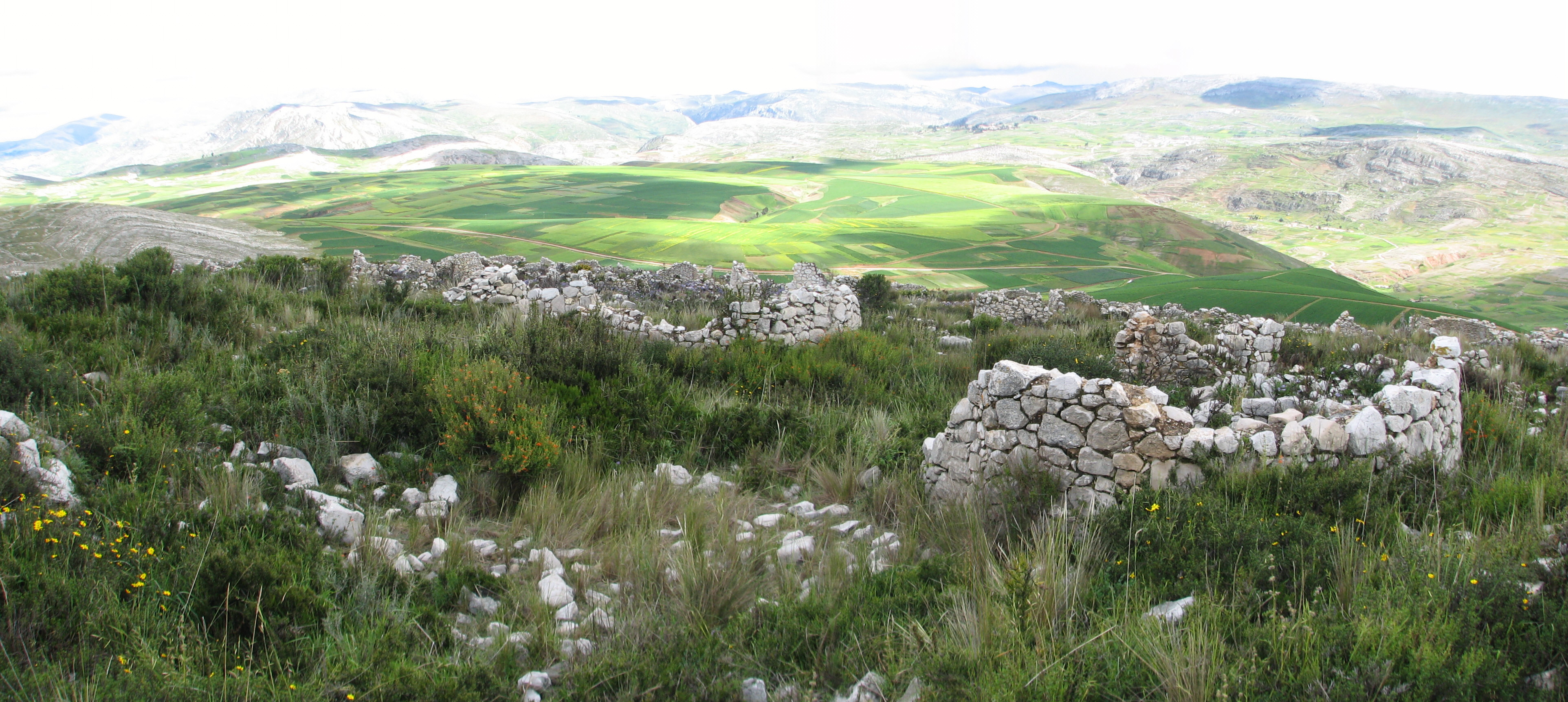 Tunanmarca Archaeological site (overview)